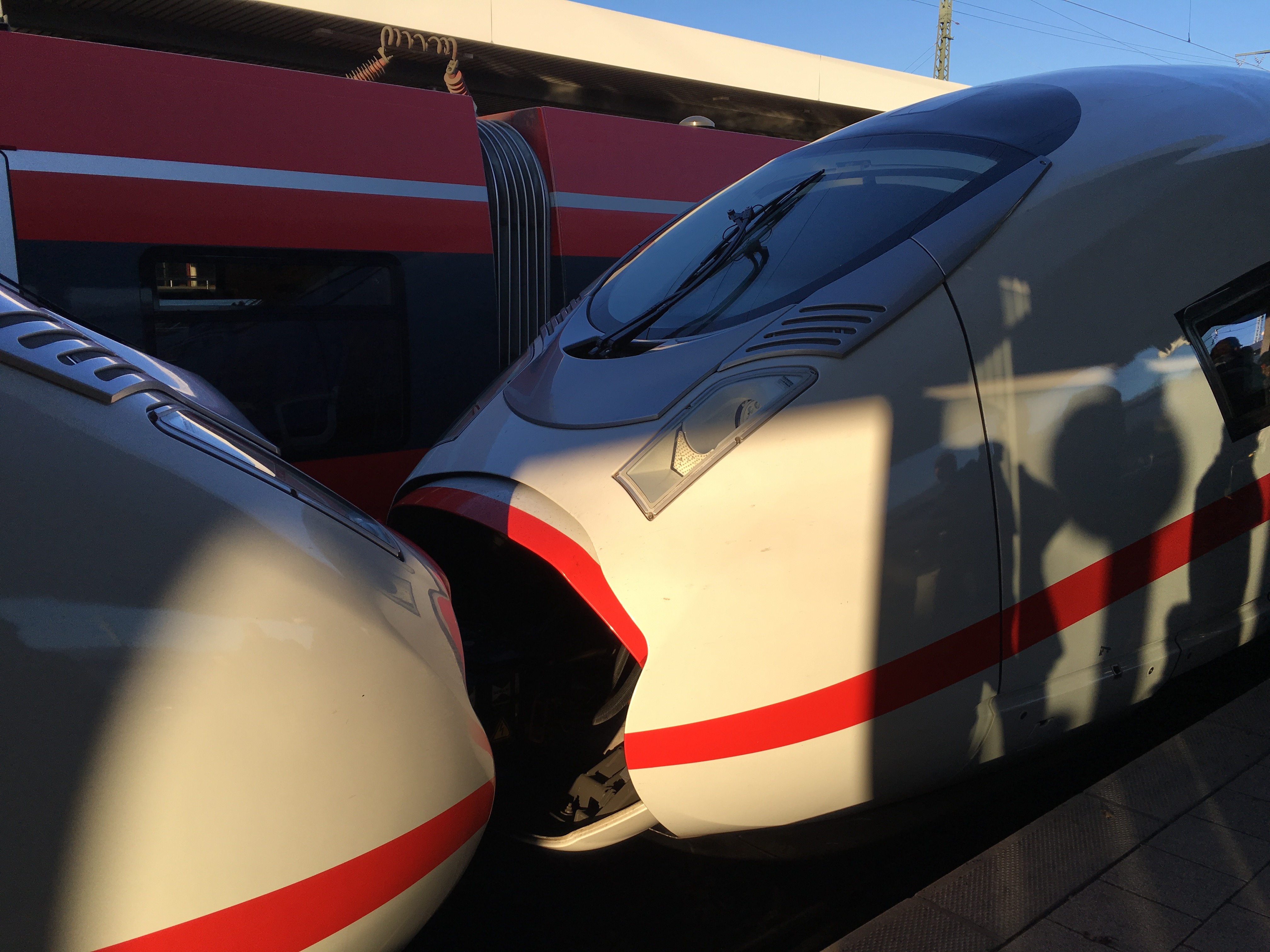 Coupled VELARO D (not ICE4) trains in Nuremberg (Nürnberg, Germany) train station, Dec 7, 2015